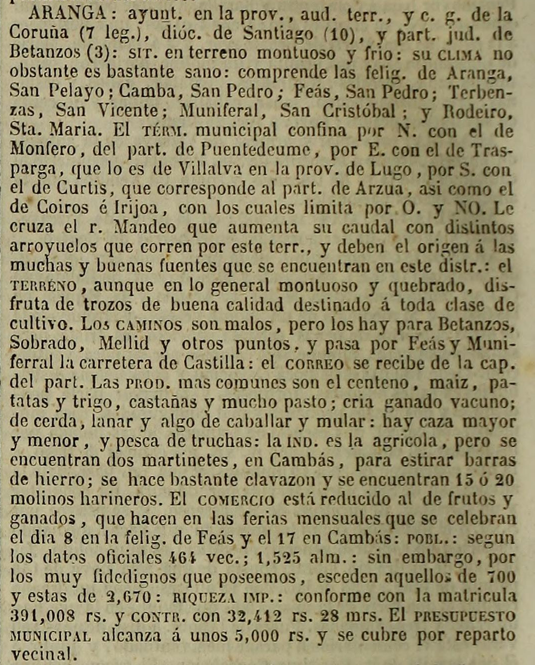 Concello de Aranga no Diccionario geográfico-estadístico-histórico de España y sus posesiones de Ultramar.